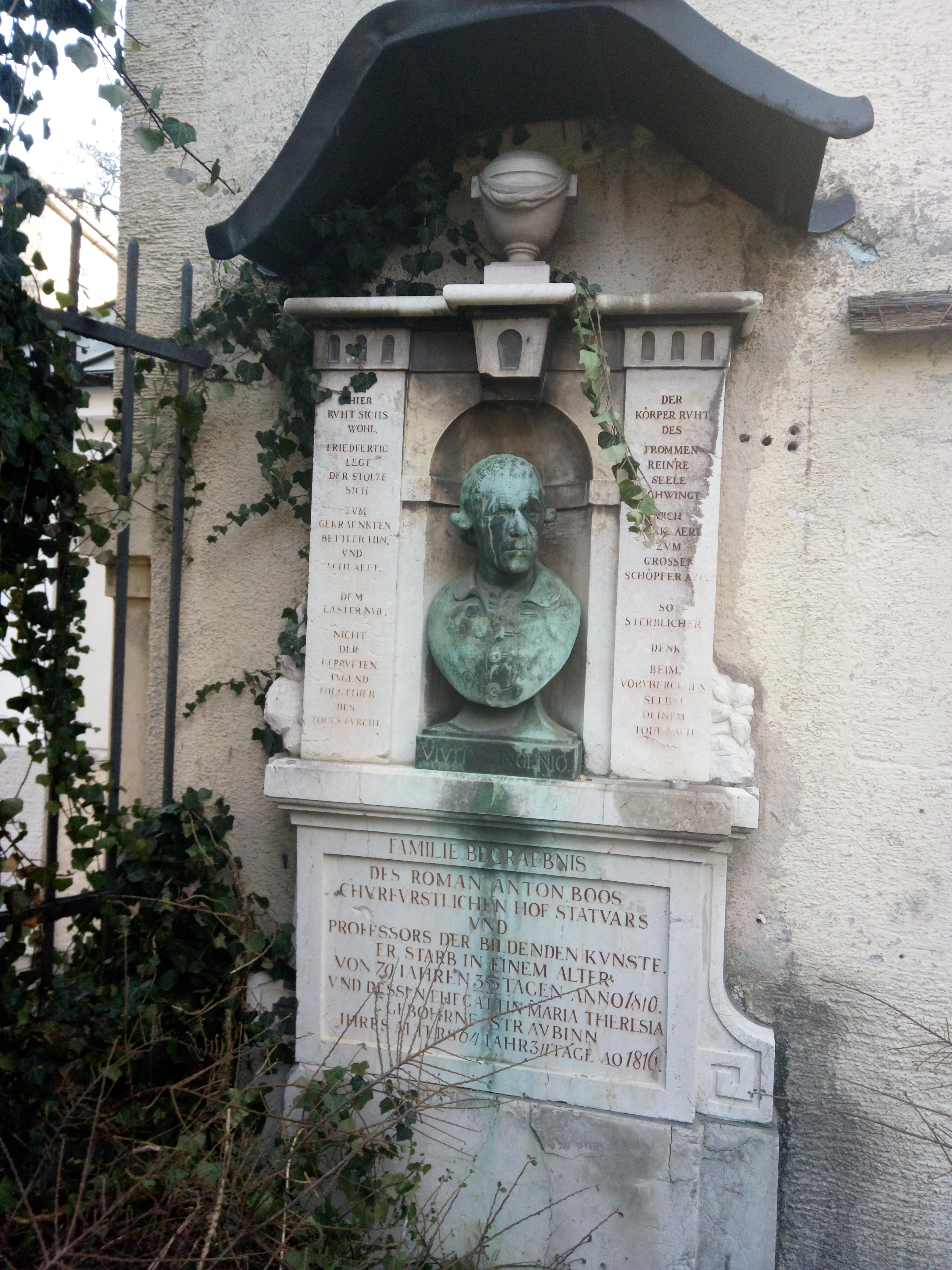 Grabmal des Münchner Bildhauers und Akademieprofessors Roman Anton Boos (1733-1810) an der Außenwand der Stephanskirche auf dem Alten Südlichen Friedhof in München.